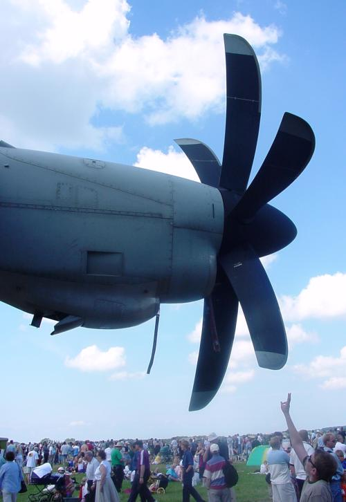 Foto taget på Flyvestation Værløse, juni 2002 i forbindelse med flyopvisning. ©2002 Hans Jørn Storgaard Andersen